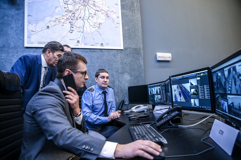 Центр управления обеспечением транспортной безопасности Московского метро